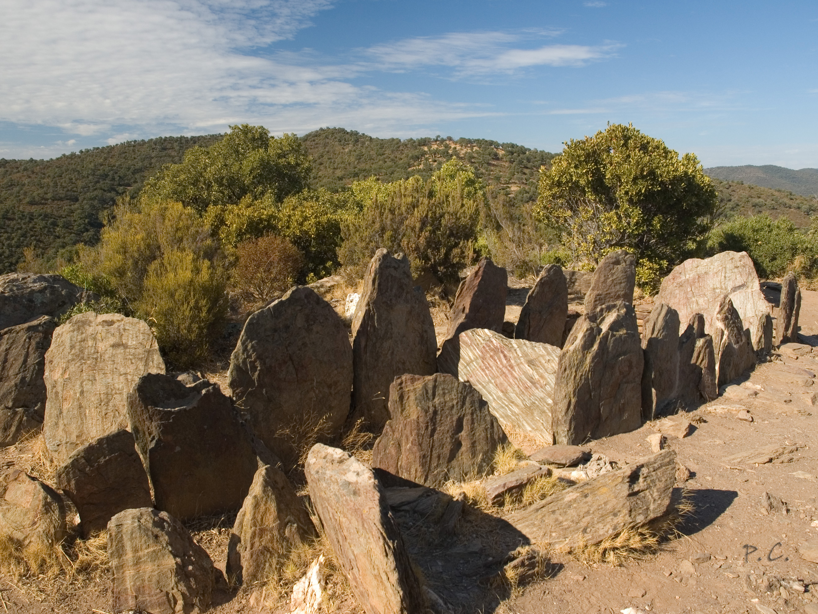 Dolmen de Gaoutabry (2500 avant JC), commune de La Londe-les-Maures, Var, France.